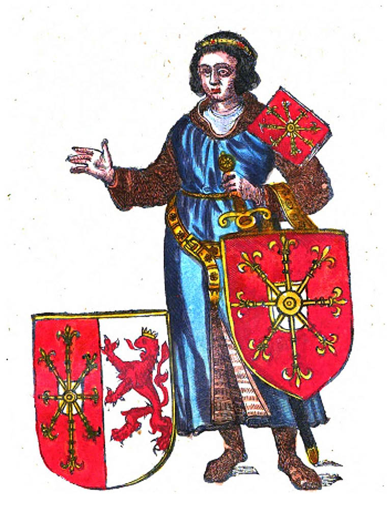 Arnold I van Kleef